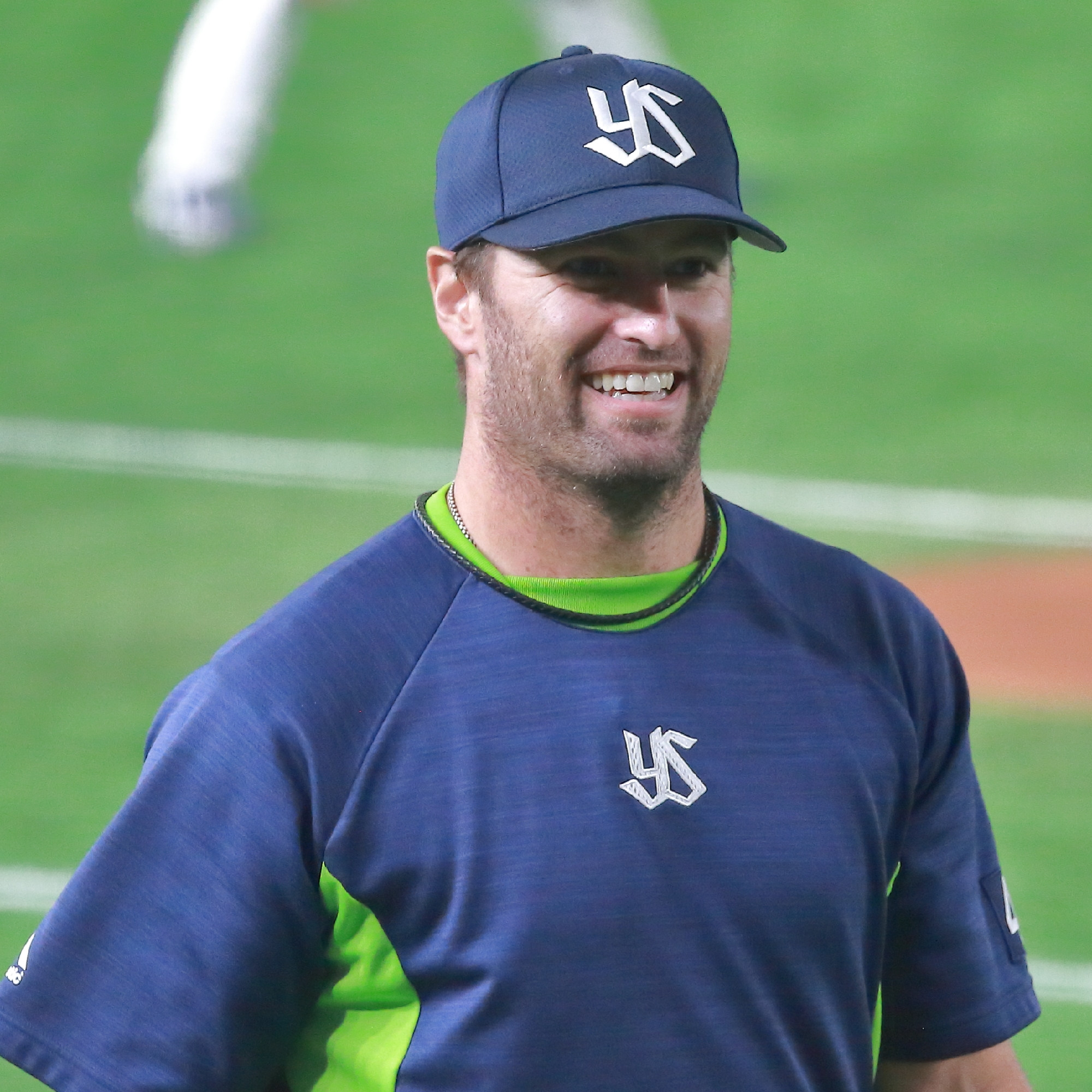 東京ヤクルトスワローズ時代のハフ投手。2019年5月10日、東京ドームで撮影。